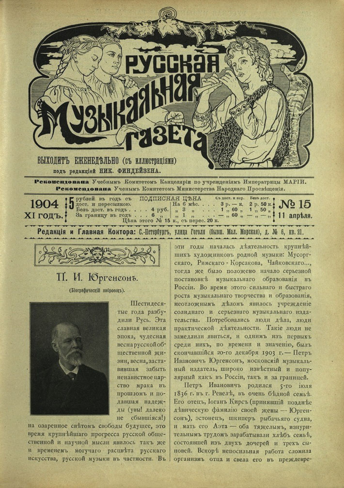 "Русская музыкальная газета". — 1904. — № 15, 11 апреля.